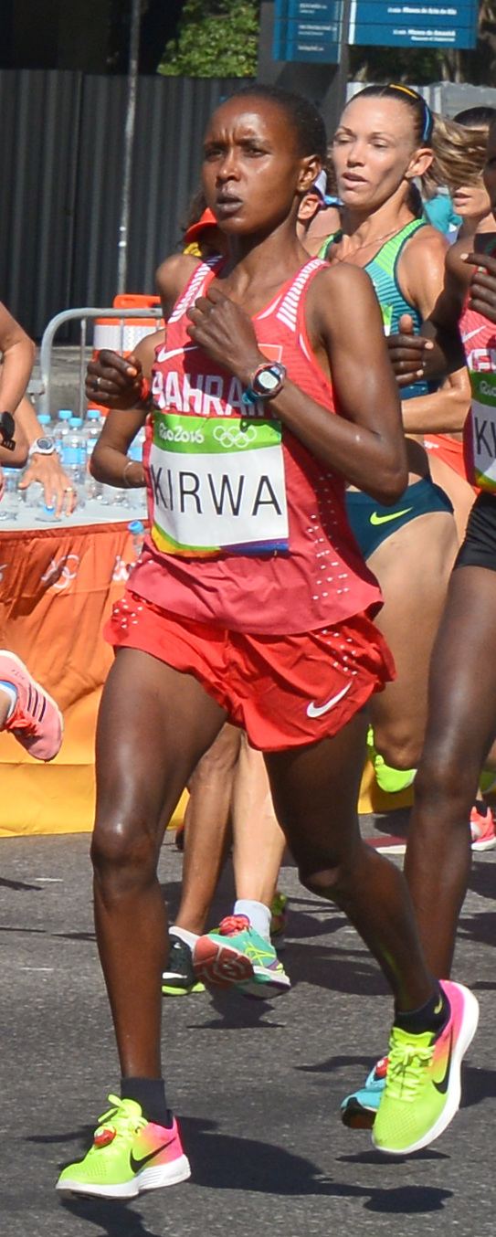 Passage du marathon des jeux olympiques de Rio 2016 dans le centre de Rio